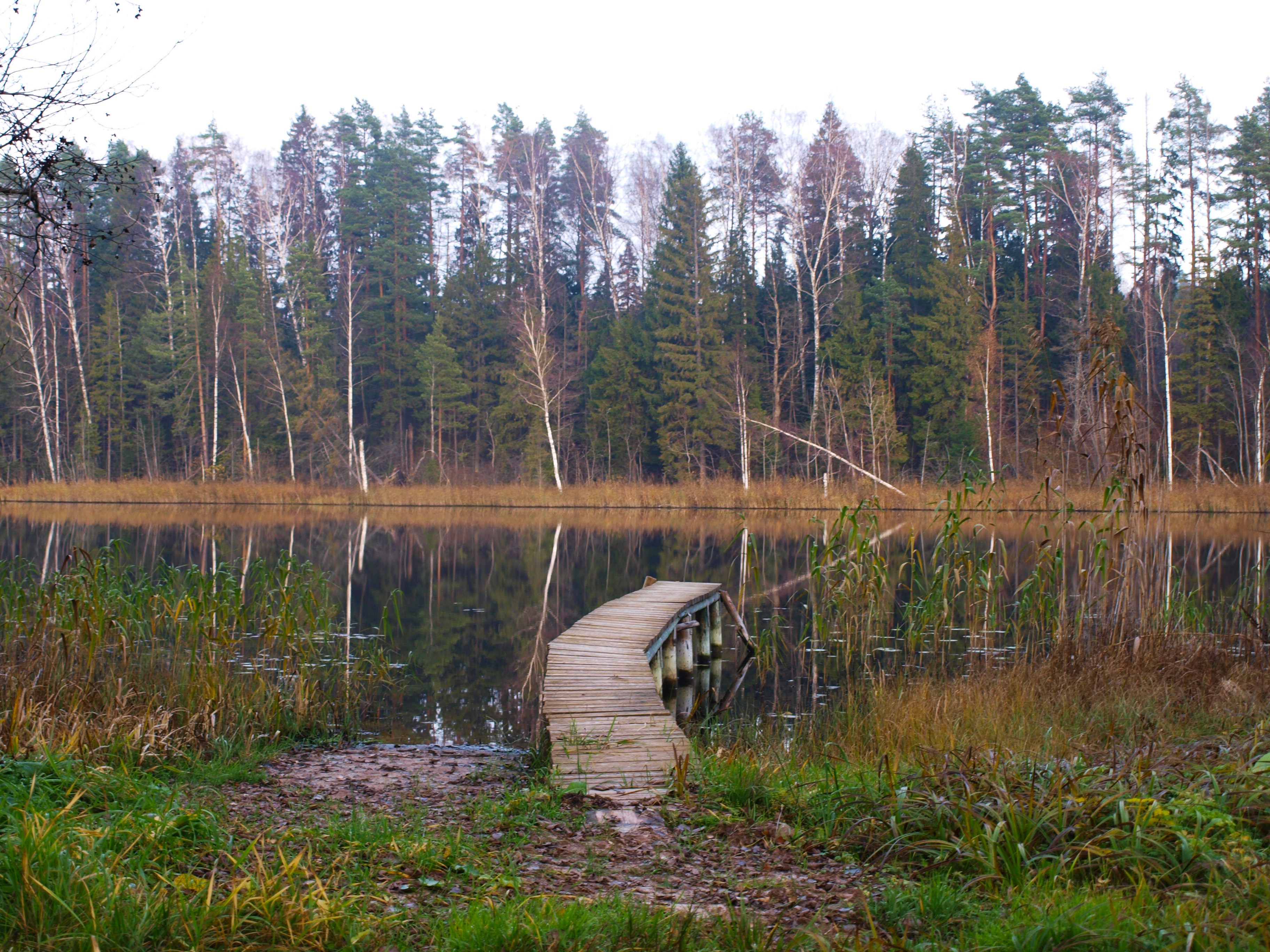 Ennuse järv - vaade edelast.